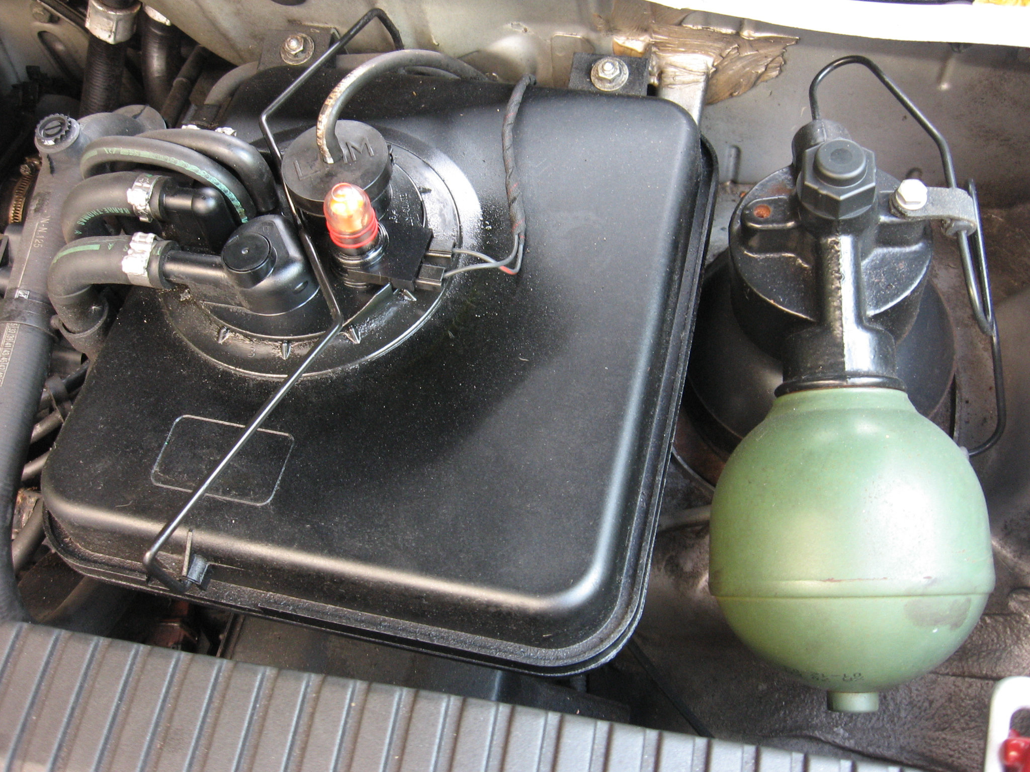 veerbol Xantia